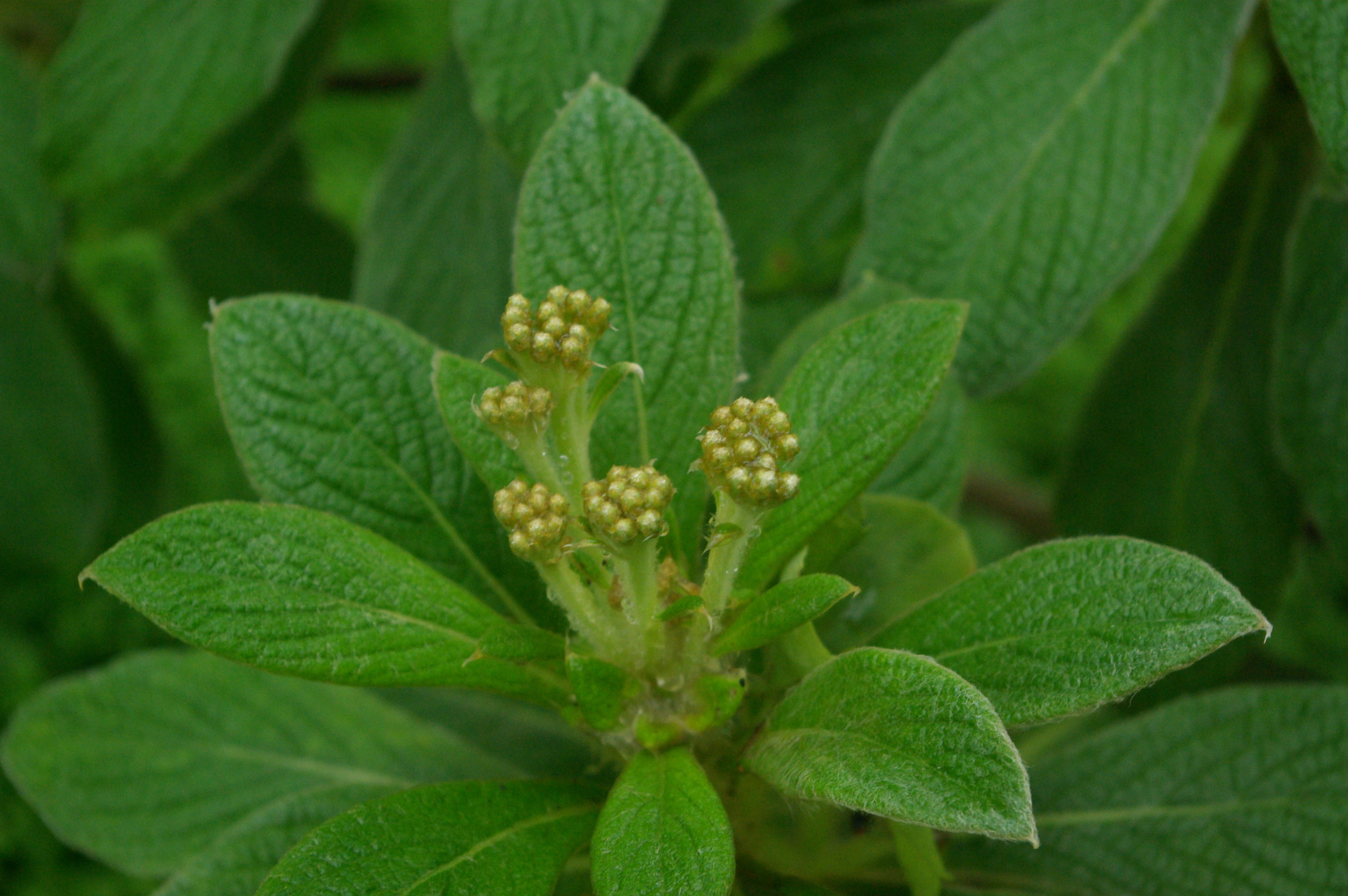 3 juillet 2015, El Funcionario